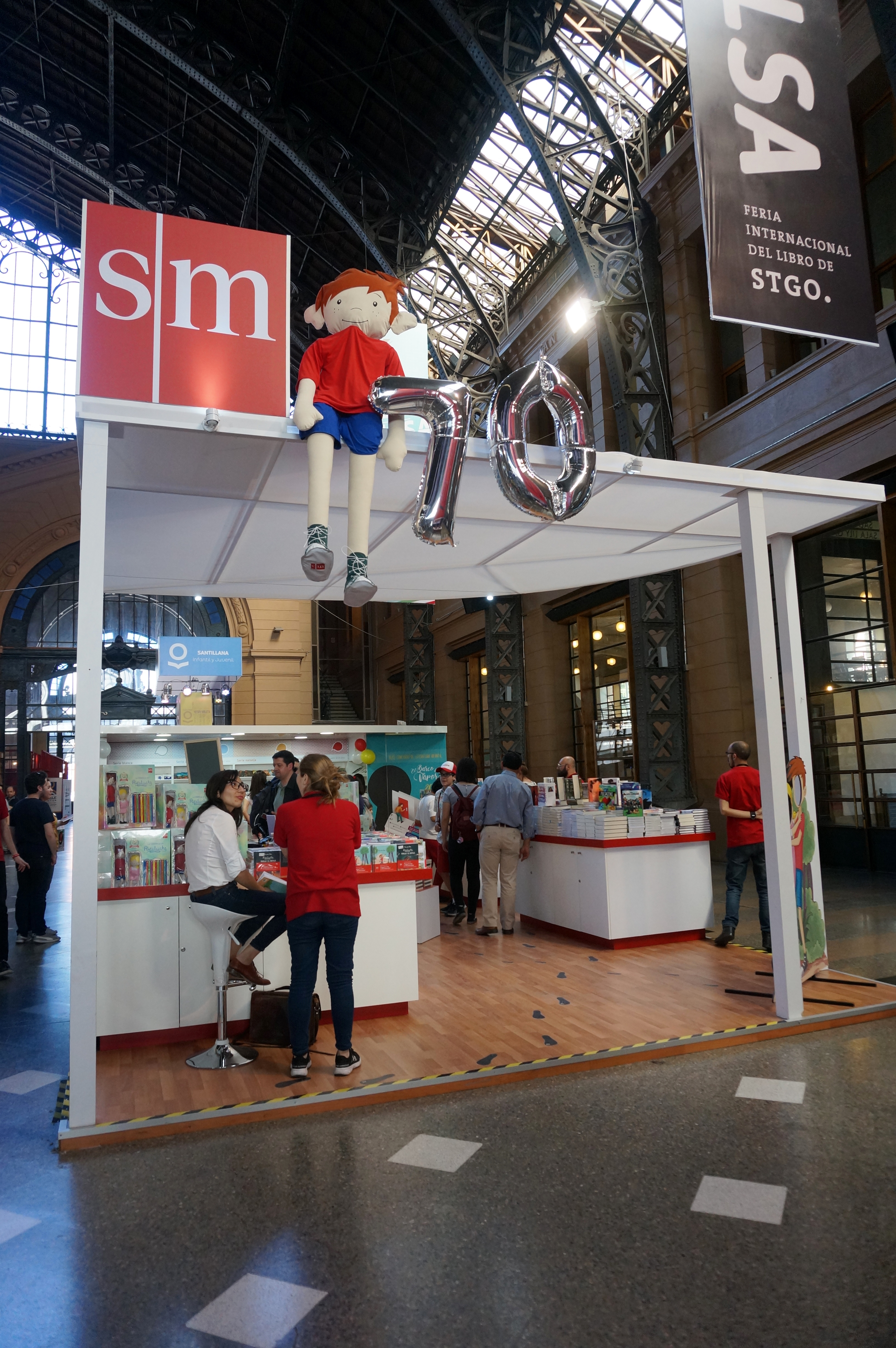 El stand de SM en la Feria Internacional del Libro de Santiago 2017. La editorial festejó en la feria los 70 años de la publicación del primer libro de Papelucho, el célebre niño de 8 años de edad que protagoniza la famosa serie creada por la escritora chilena Papelucho, Marcela Paz